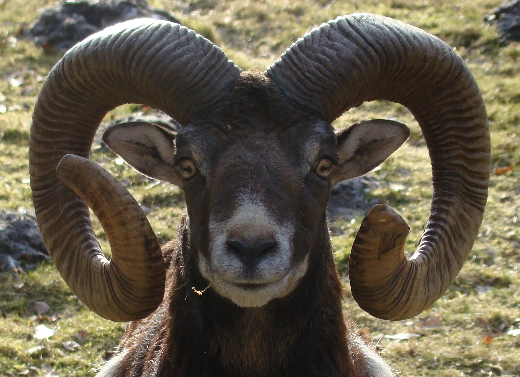 Widderkopf (Europäischer Mufflon)